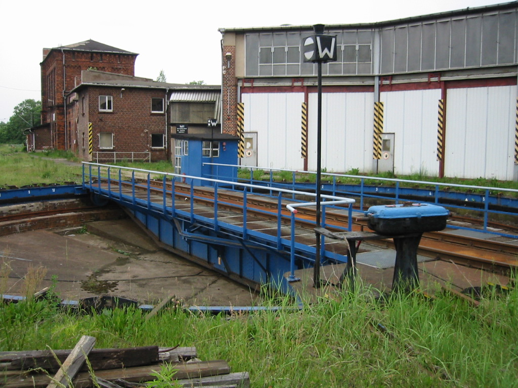 20m-Drehscheibe im ehemaligen Bw Gotha